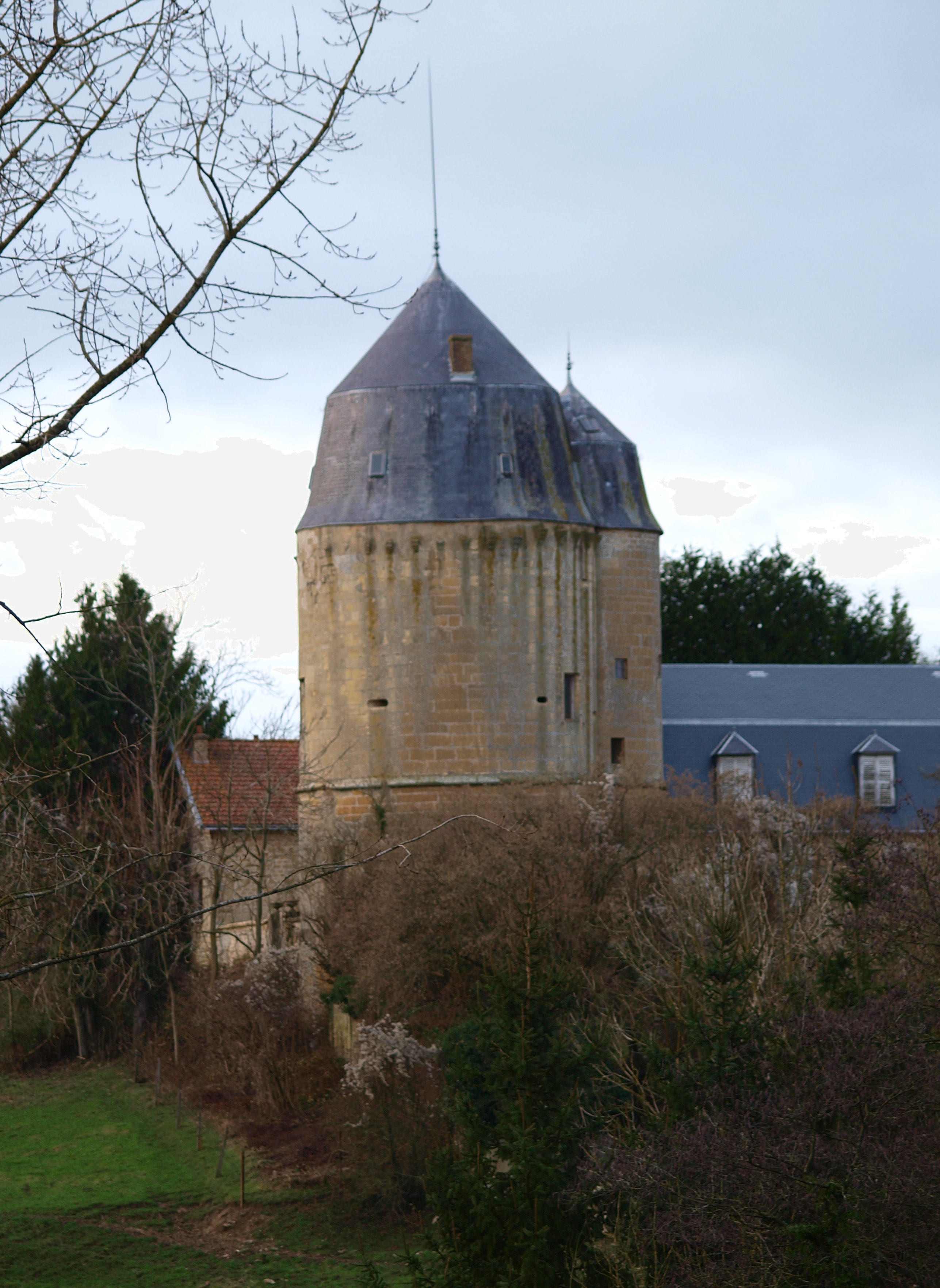 Neuville-Day (Ardennes, France) ; hameau de Day ; le donjon.